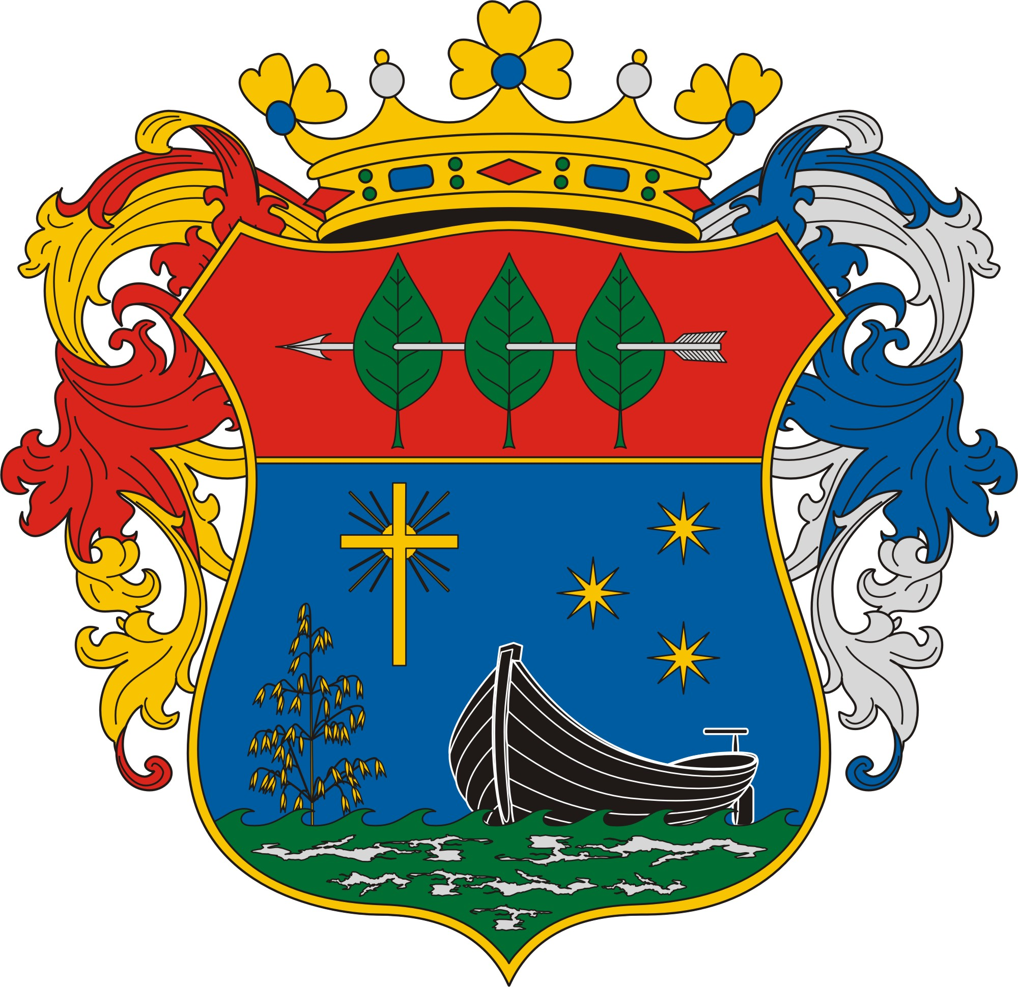 Coat of arms of Ferencszállás, Hungary